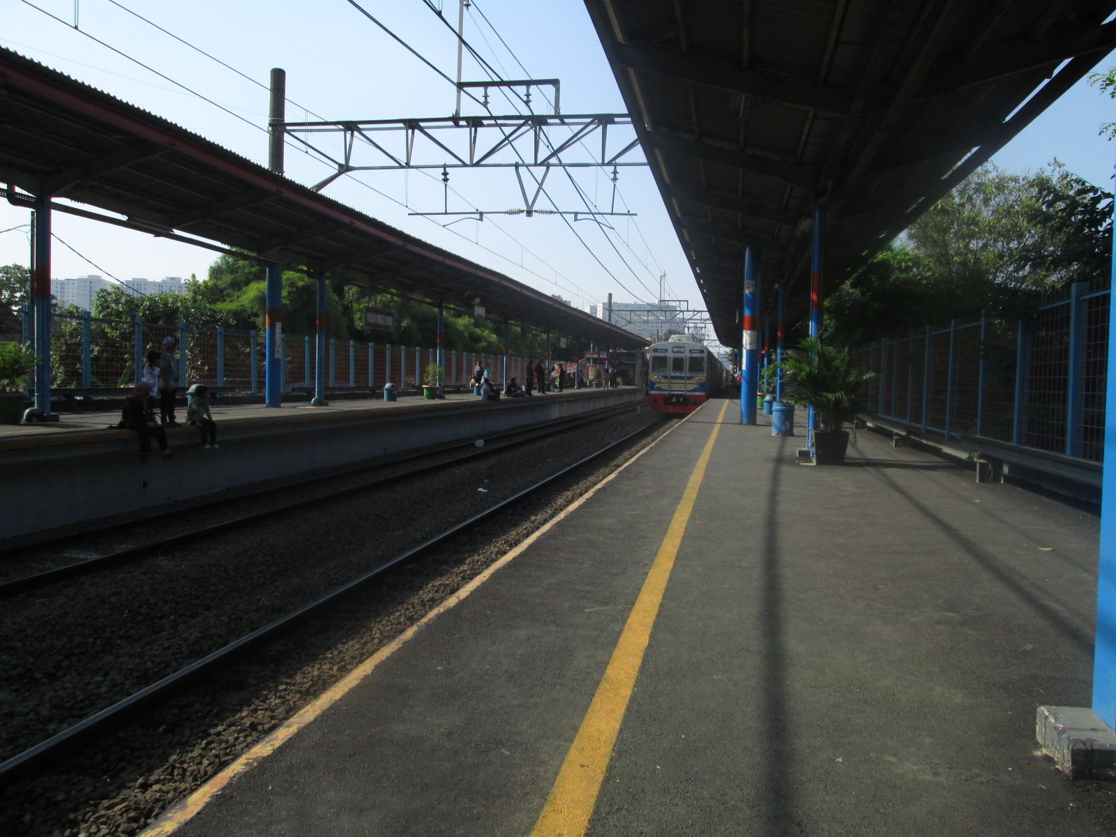 Stasiun Pasar Minggu Baru